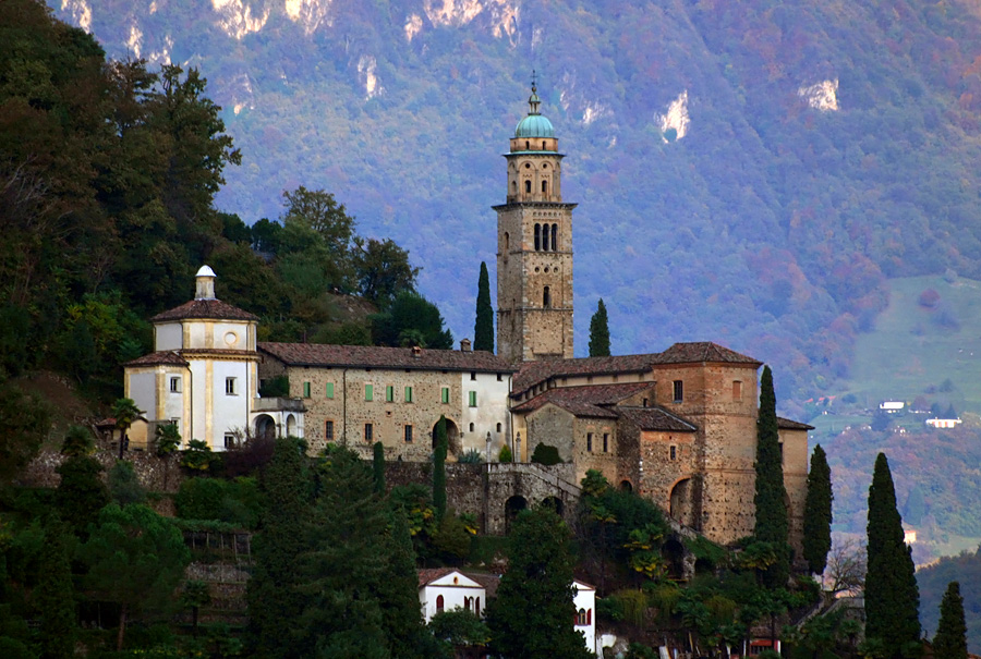 Chiesa di Santa Maria del Sasso di Morcote, vista dalla sponda italiana del Lago di Lugano